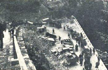 Umik slovenske narodne vojske čez Ljubelj maja 1945